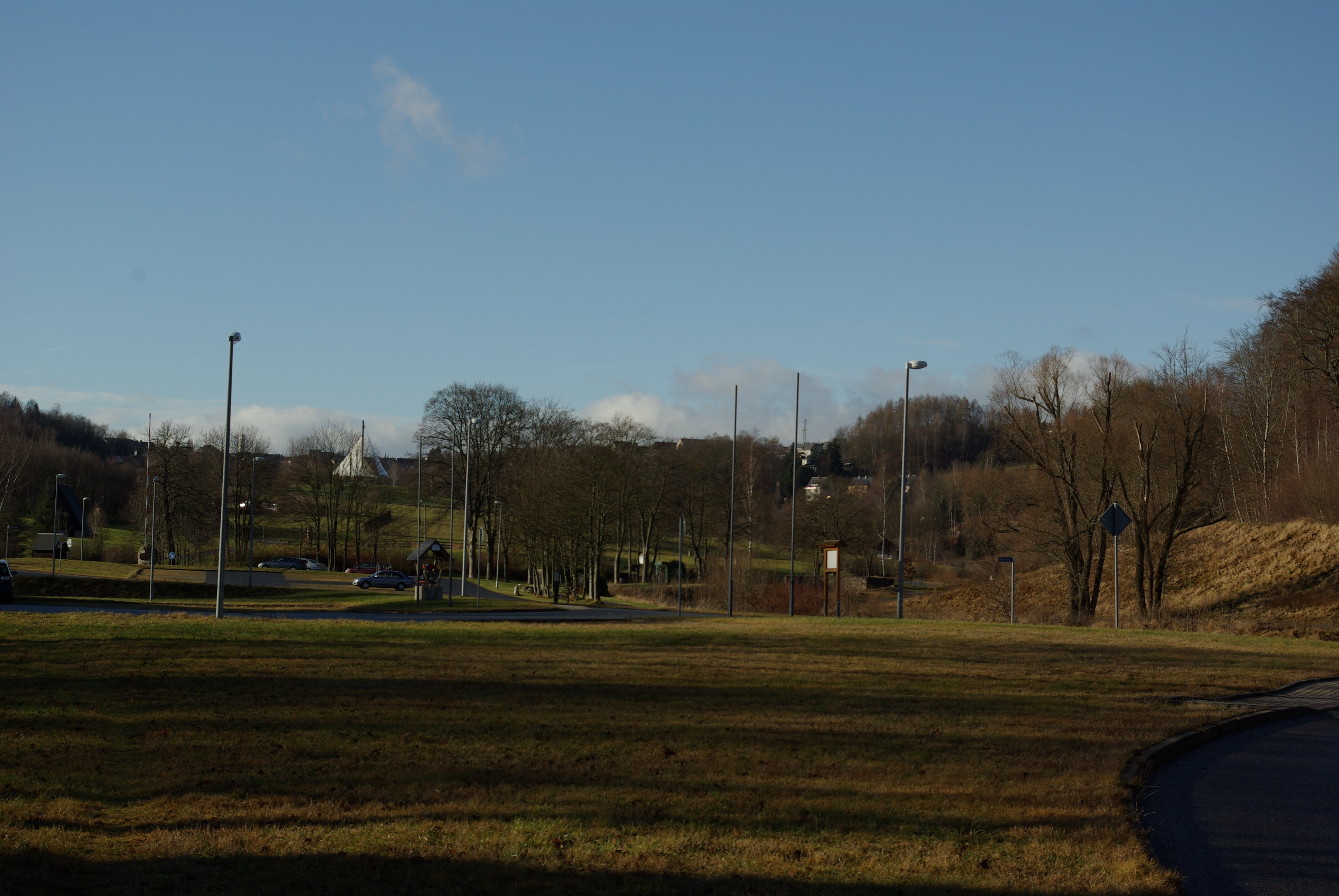 Blaufarbenwerk Oberschlema1